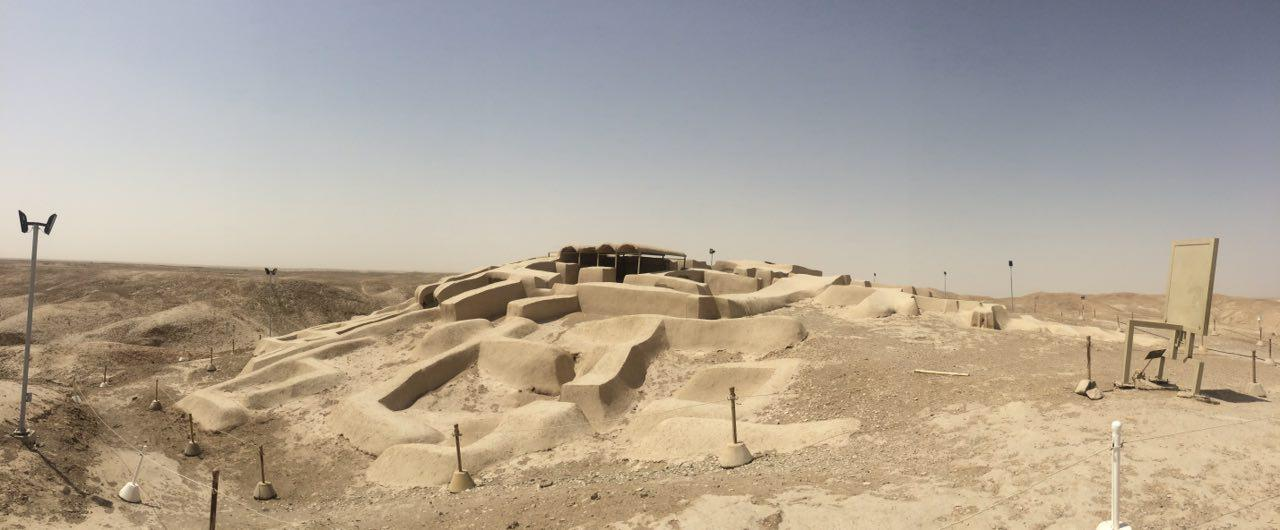 کاخ سوخته شهر سوخته